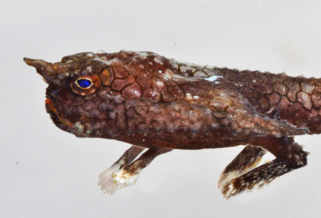 Malthopsis gnoma (Curacao)